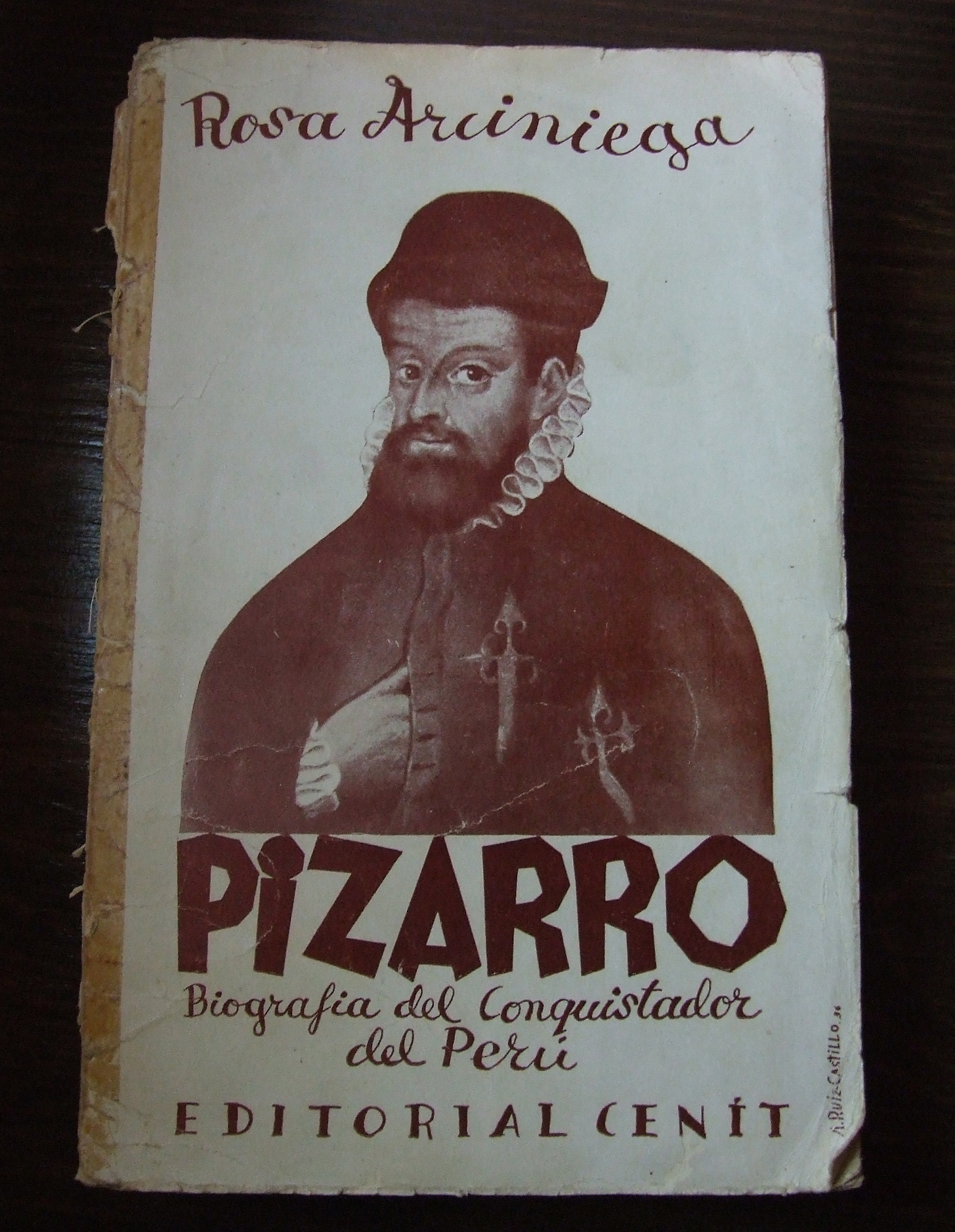 Description: Portada del libro de Rosa Arciniega sobre la biografía de Francisco Pizarro, editado en Madrid en 1936 por la Editorial Cenit. Photographer: © Sirious Shot date : 6 de Diciembre de 2010